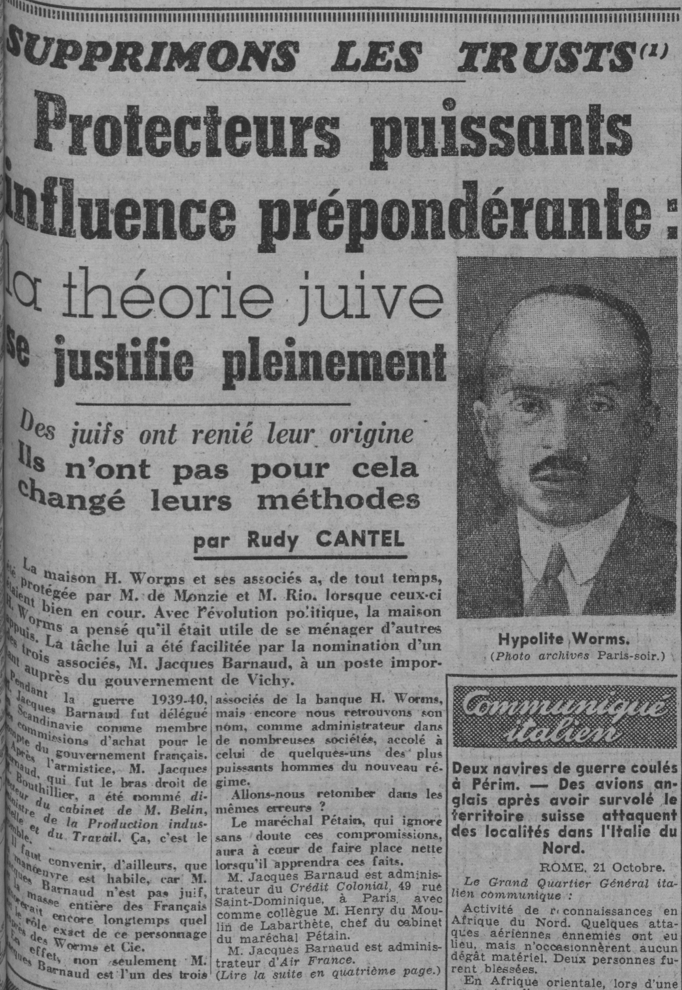 Article antisémite de Rudy Cantel vitupérant les trusts, "l'influence juive" et la banque Worms. Une du journal collaborationniste Paris-Soir du 23 octobre 1940.